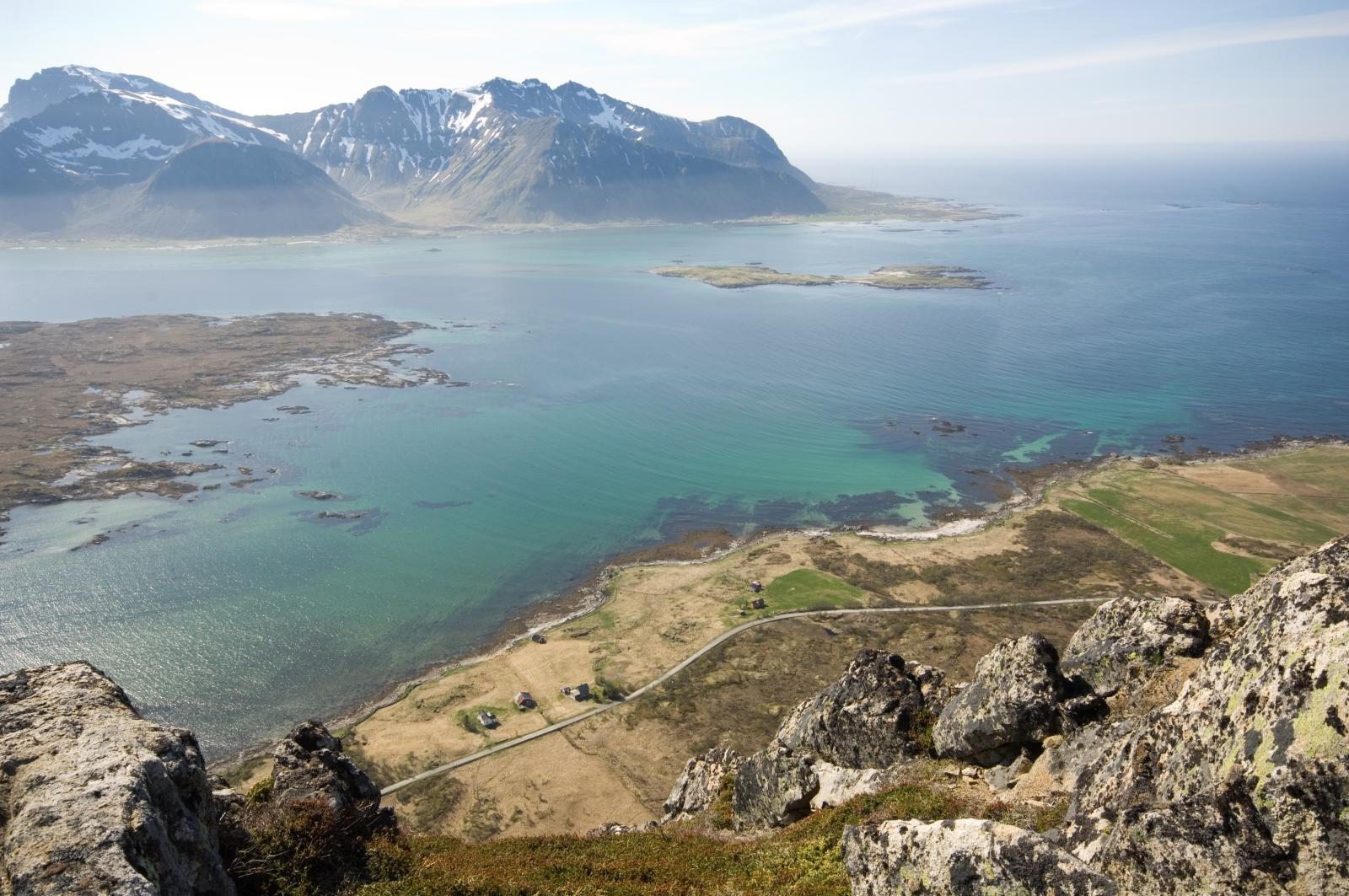 Utsyn vestover frå Hoven. Vegen ein ser nedom Hoven er Fylkesveg 862 i Nordland. Vikspollen og Sundklakkstraumen, så Vestvågøya.